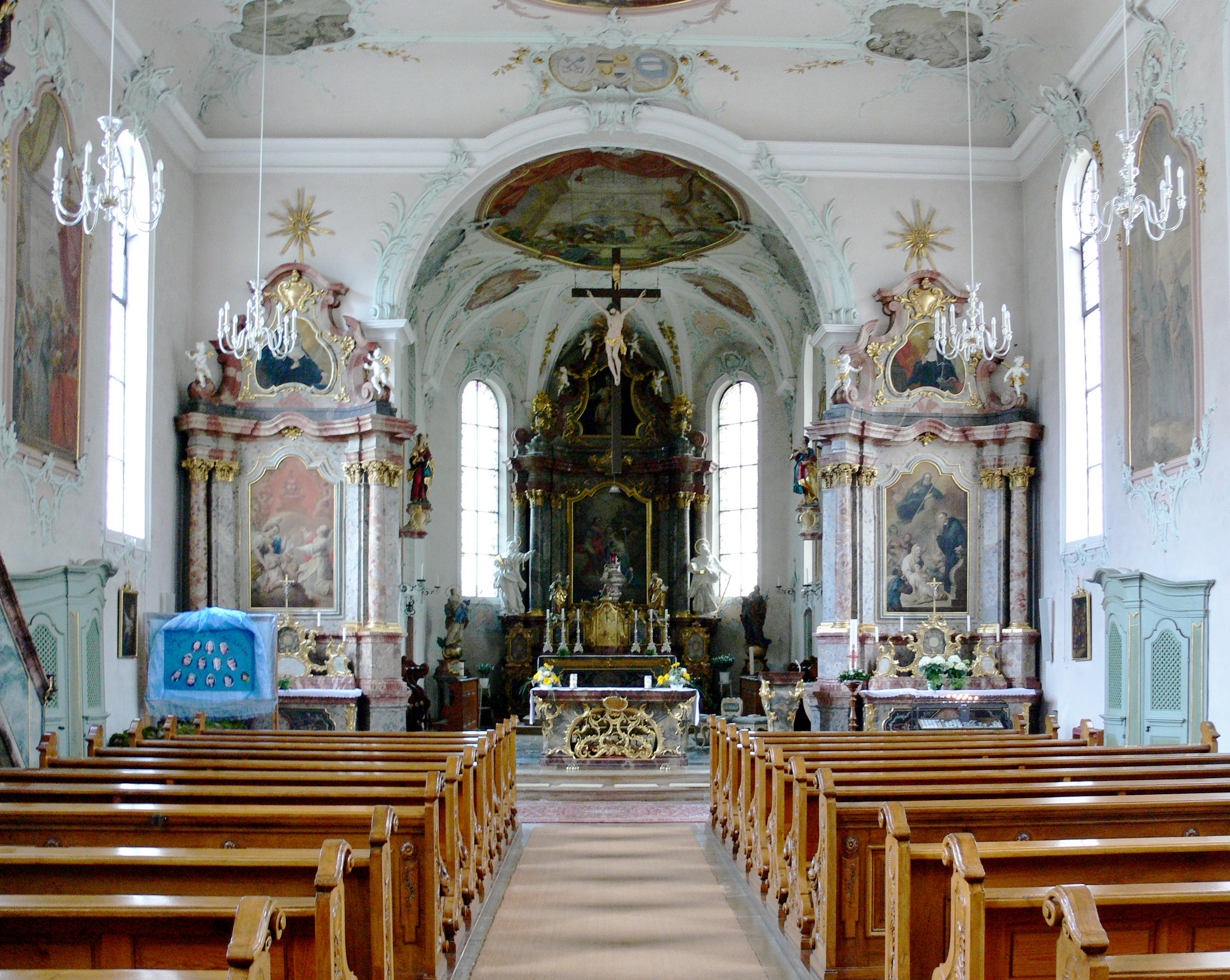 Pfarrkirche St. Ulrich, St. Ulrich im Schwarzwald, Gemeinde Bollschweil Blick durch das Langhaus zum Chor